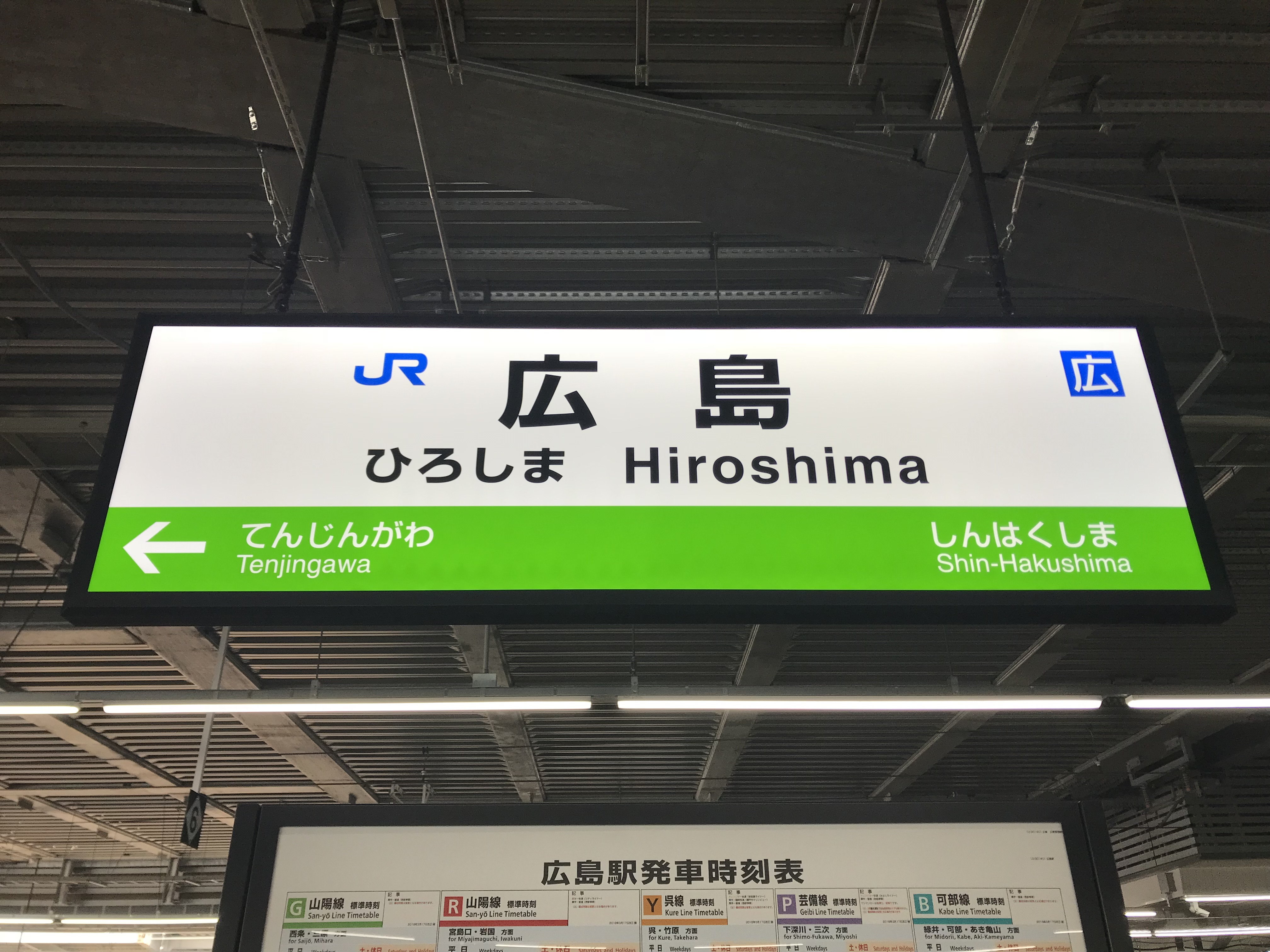 広島駅(山陽本線)の駅名標